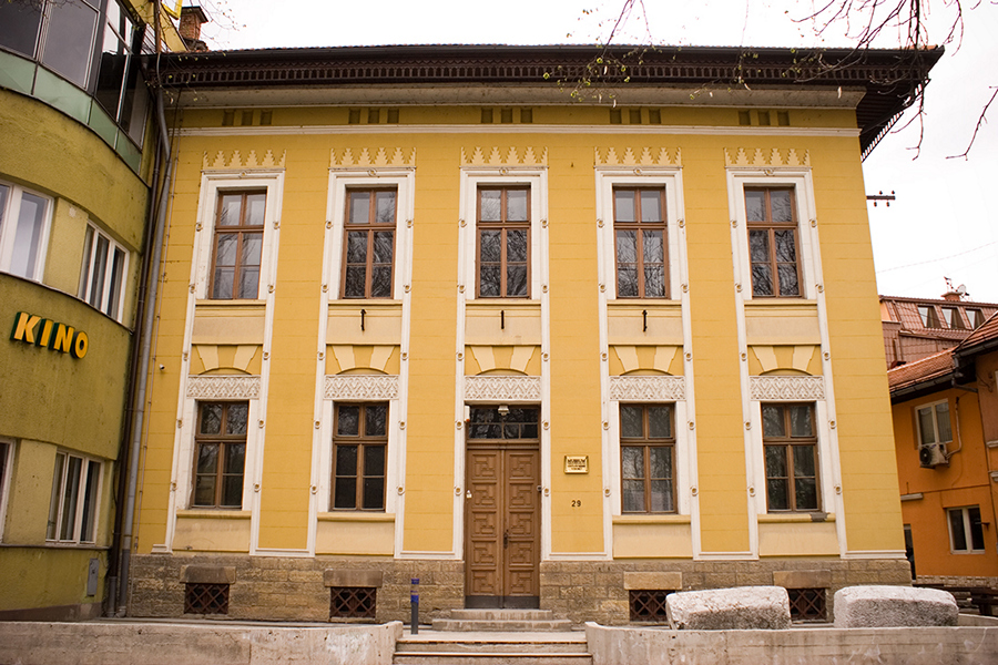 Zgrada Zavičajnog muzeja u Visokom